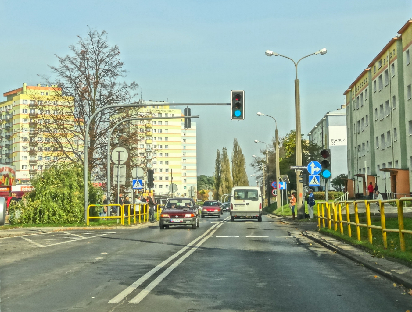 Ulica Planu 6-letniego na osiedlu Kapuściska w Bydgoszczy